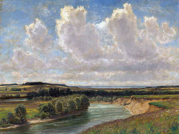 An der Amper